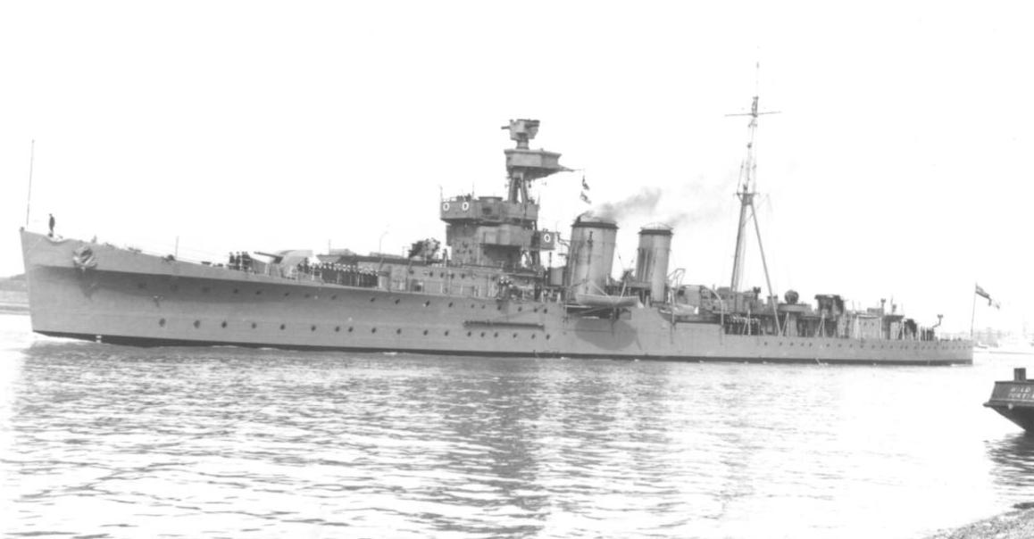 Der bitische Flugabwehrkreuzer HMS CAIRO